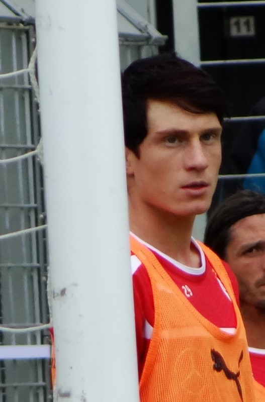 Sven Mende beim Aufwärmen vor dem Spiel VfB II - Saarbrücken. Aufgenommen von